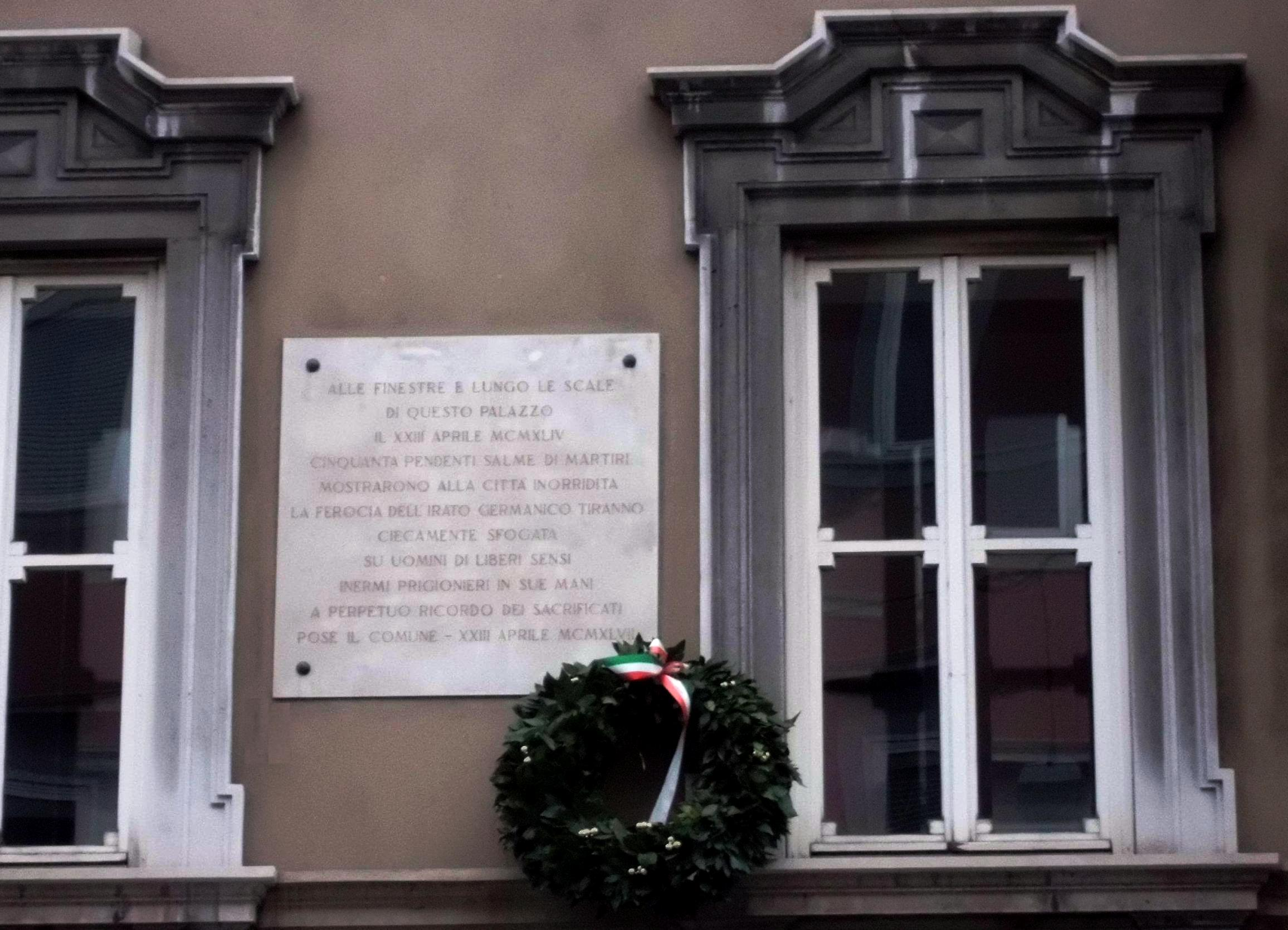 Lapide posta sulla facciata del Palazzo Rittmayer a Trieste in via Ghega 12